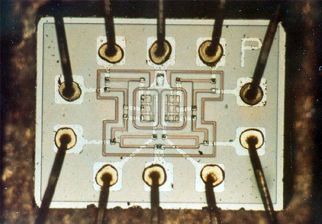 Apollo Guidance Computer NOR-Gatter (Block2) Quelle: NASA (pd)